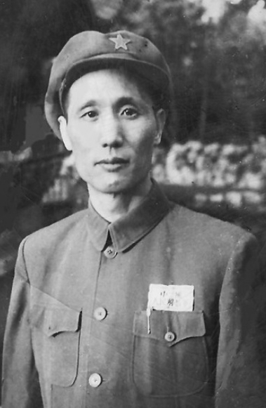 向明（1909～1969） ，山东临朐人，中国共产党、中国人民解放军人物。